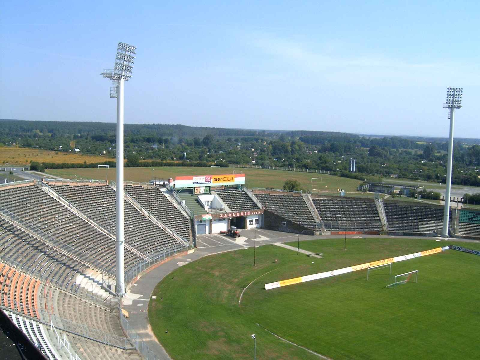 Lubin - stadion Zagłębia Lubin